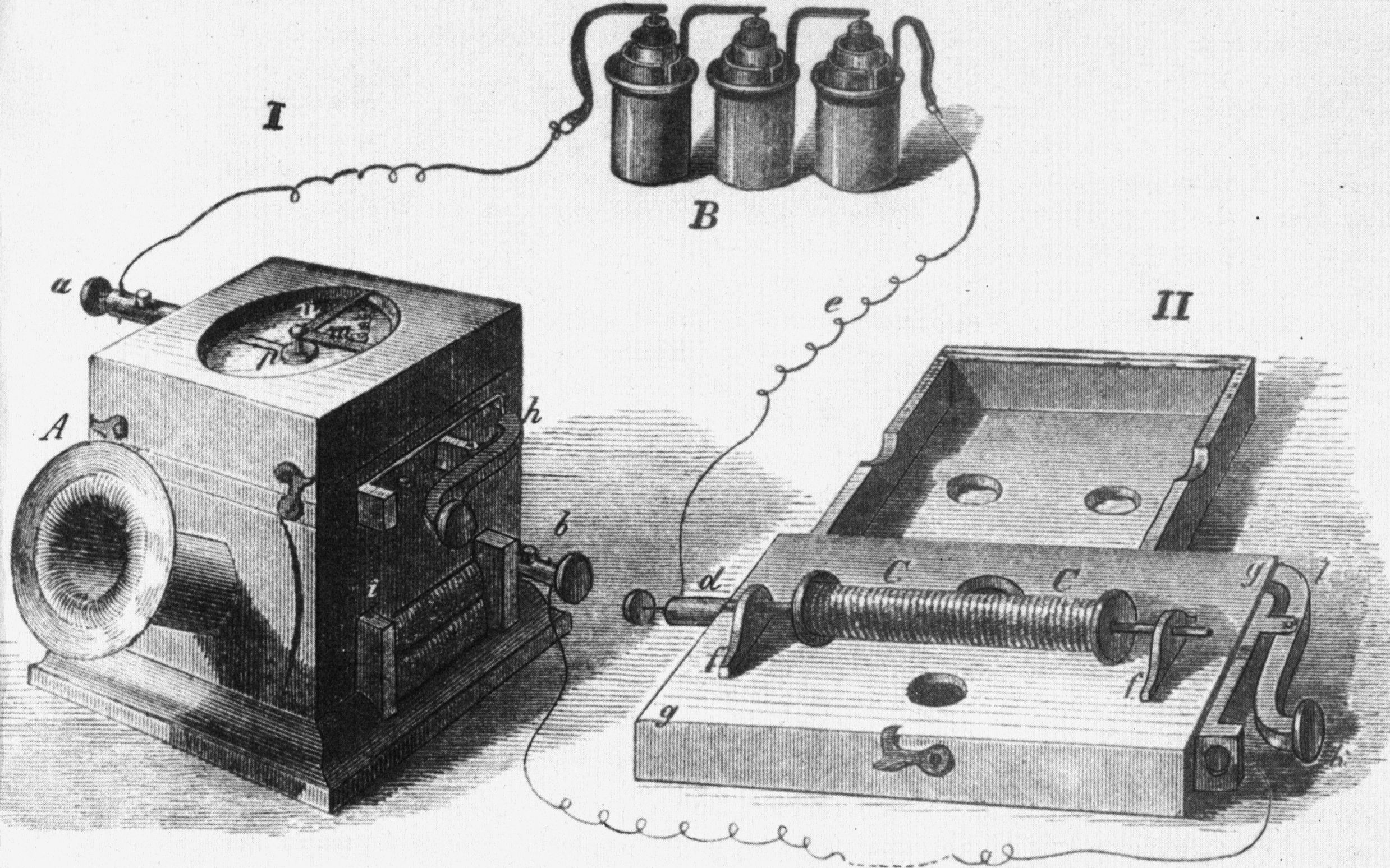 Johann Philipp Reis telephone